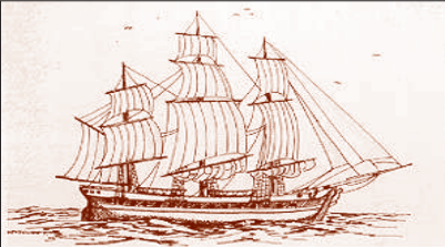 Goleta Colo Colo, la de 1836